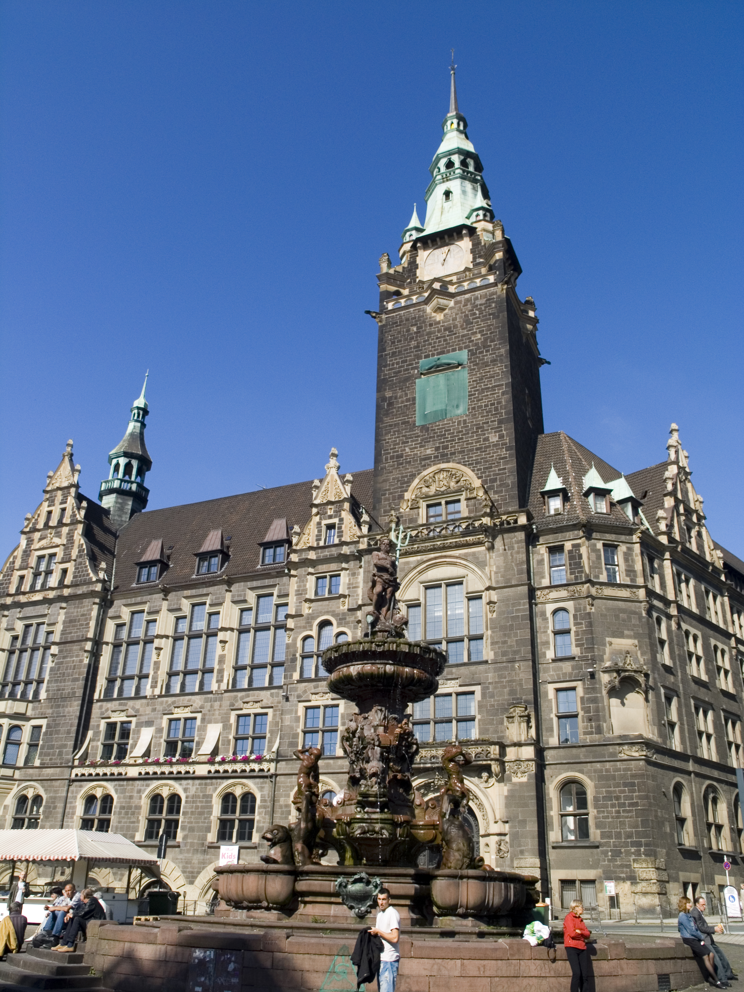 Ратуша Эльберфельда в Вуппертале